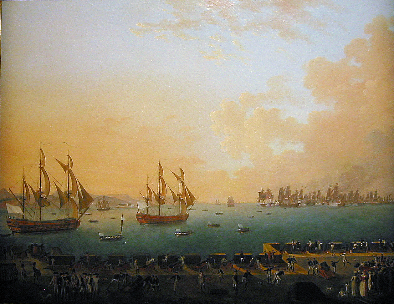 1779 "Combat de la Martinique". Photographed at the Musee de la Marine, Paris, 2006.